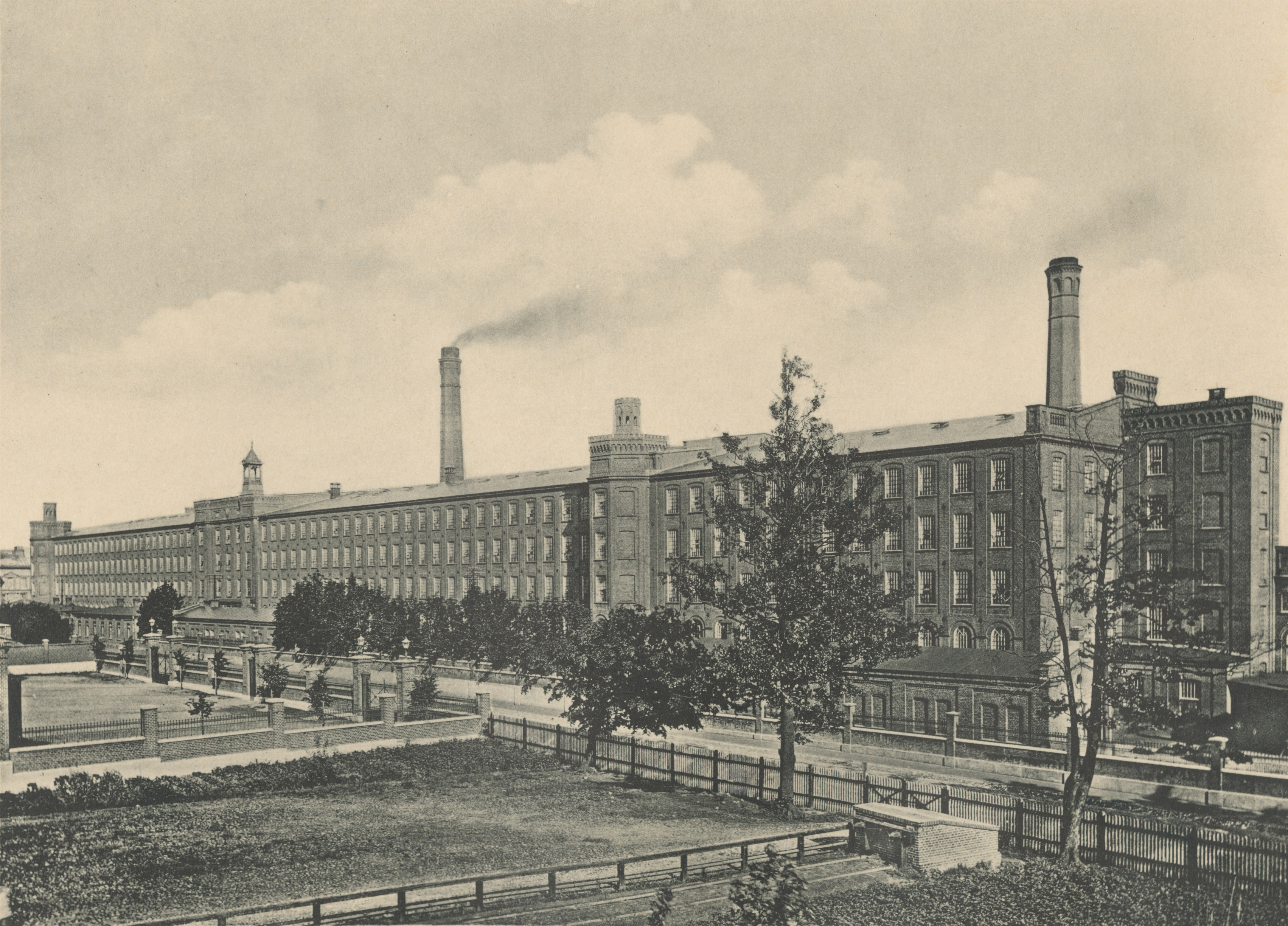 Fotografia przedstawia przędzalnię będącą częścią Fabryki Towarzystwa Akcyjnego Karola Scheiblera na Księżym Młynie, widok od ulicy Emilii (obecnie ulica Tymienieckiego). Karol Scheibler w latach 50. XIX wieku w ciągu kilku lat wybudował w Łodzi najnowocześniejszą fabrykę tekstylną ówczesnej Europy, stopniowo tworząc przemysłowe imperium. Przędzalnia na Księżym Młynie, zbudowana w latach 1876-1878, to duży 207 metrowy, liczący cztery kondygnacje budynek, zawierający w swym wnętrzu hale produkcyjne, rozlokowane symetrycznie od wschodu i zachodu względem części środkowej. W centralnej części umieszczono maszynę parową, która napędzała warsztaty pracujące na różnych poziomach. W ośmiobocznych wieżach zakończonych krenelażem i blankami znajdowały się klatki schodowe i windy. Od połowy lat 70. XIX wieku zakłady Scheiblera były w ścisłej czołówce całej branży włókienniczej Cesarstwa Rosyjskiego. Koncentrowały około 60% produkcji i 55% robotników przemysłu włókienniczego w Królestwie Polskim. W latach 1870 i 1872 otrzymały prawo znakowania produkcji herbem Cesarstwa. W drugiej dekadzie XXI wieku widoczny na zdjęciu budynek fabryczny został poddany rewitalizacji i przerobiony na lofty, czyli lokale mieszkalne. Fotografia pochodzi z wydanego w 1896 roku albumu Bronisława Wilkoszewskiego „Widoki m. Łodzi”. Saryusz Bronisław Paweł Wilkoszewski (1847-1901), zwany "łódzkim Canaletto" był mistrzem fotografii ilustracyjnej. Udokumentował zabudowę Łodzi z końca XIX wieku przede wszystkim wille, fabryki, budynki użyteczności publicznej, obiekty sakralne, ulicę Piotrkowską. Jego zakład fotograficzny znajdował się w willi "Trianon" w Pasażu Meyera 5 (obecnie ulica Moniuszki).